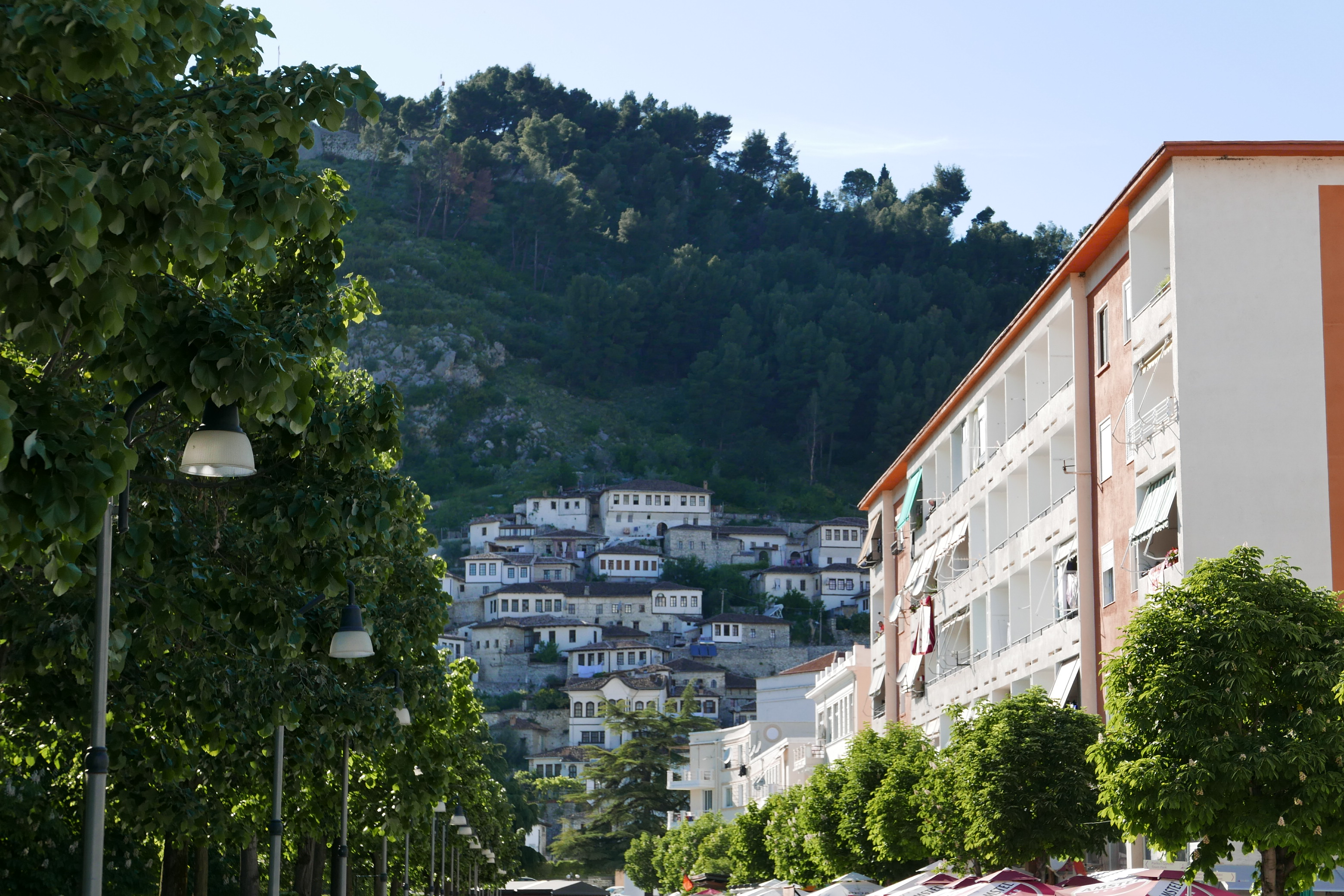 Berati i 1001 dritareve